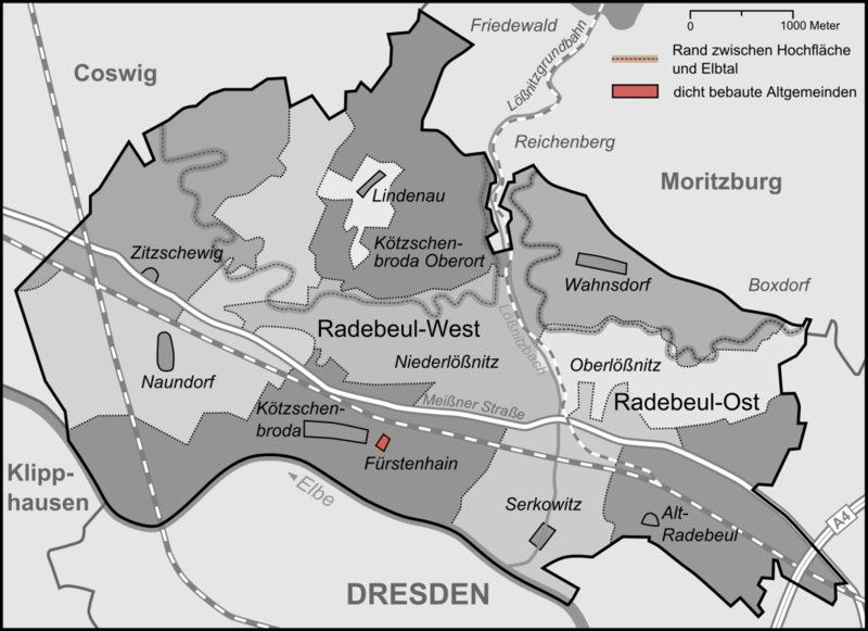 Karte der Stadtteile und Umlandgemeinden Radebeuls, hier Stadtteil Fürstenhain